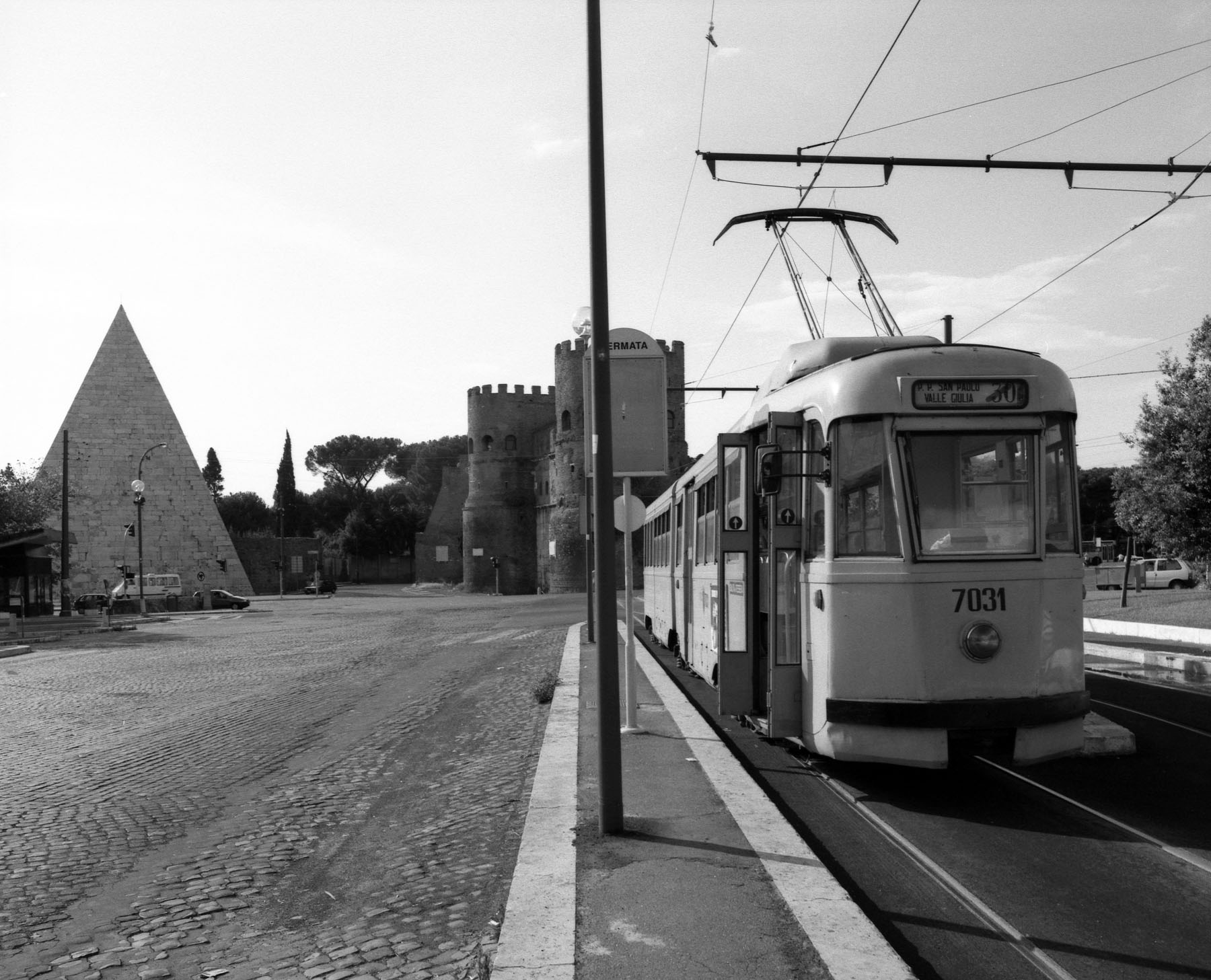 Il capolinea ATAC 30 barrato a San Paolo Licensing Categoria:Immagini di Indeciso 42 controllate